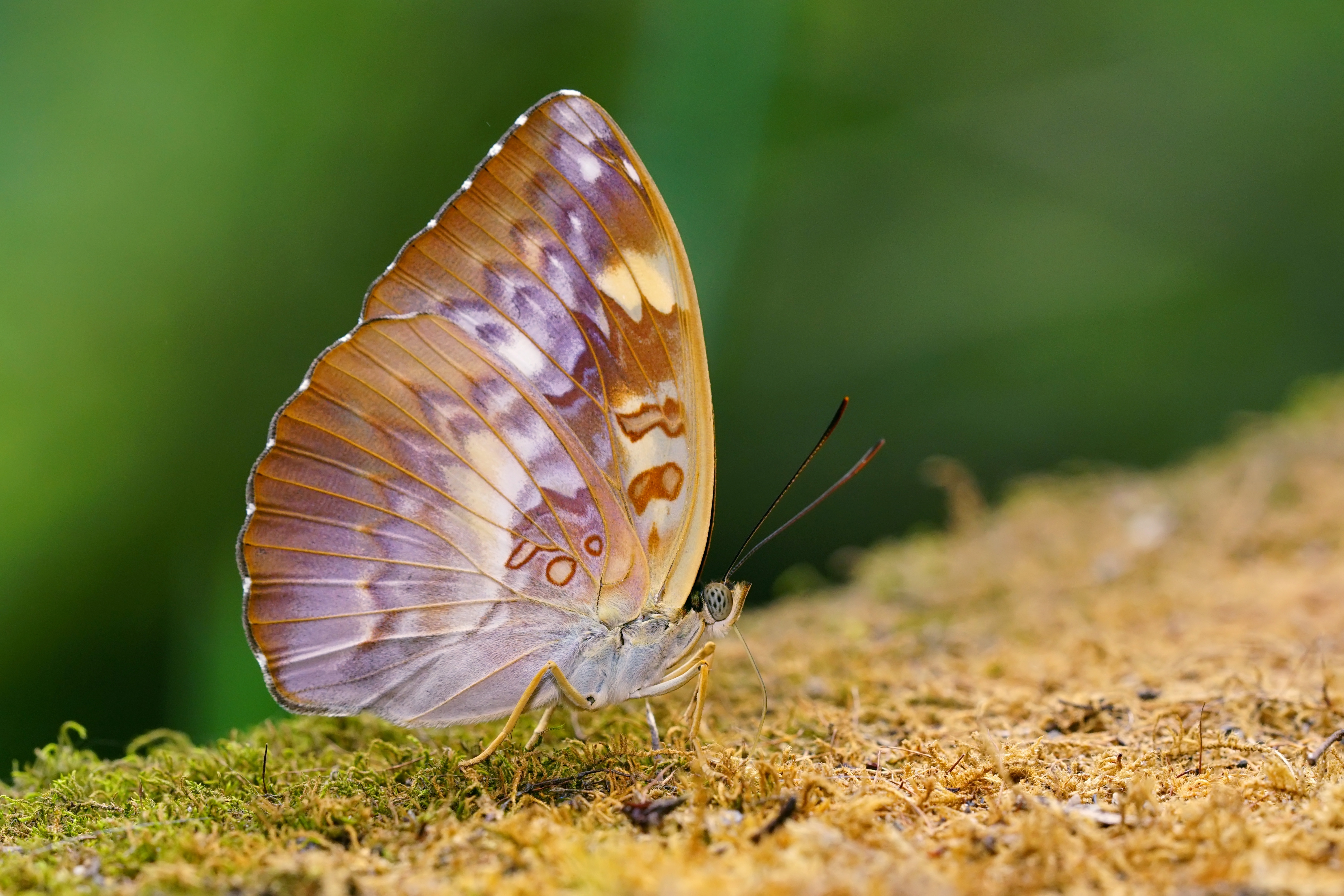 瑙蛺蝶 Abrota ganga formosana 雌